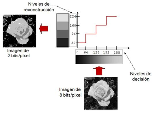 Exemple quantificador uniforme amb imatge original i quantificada